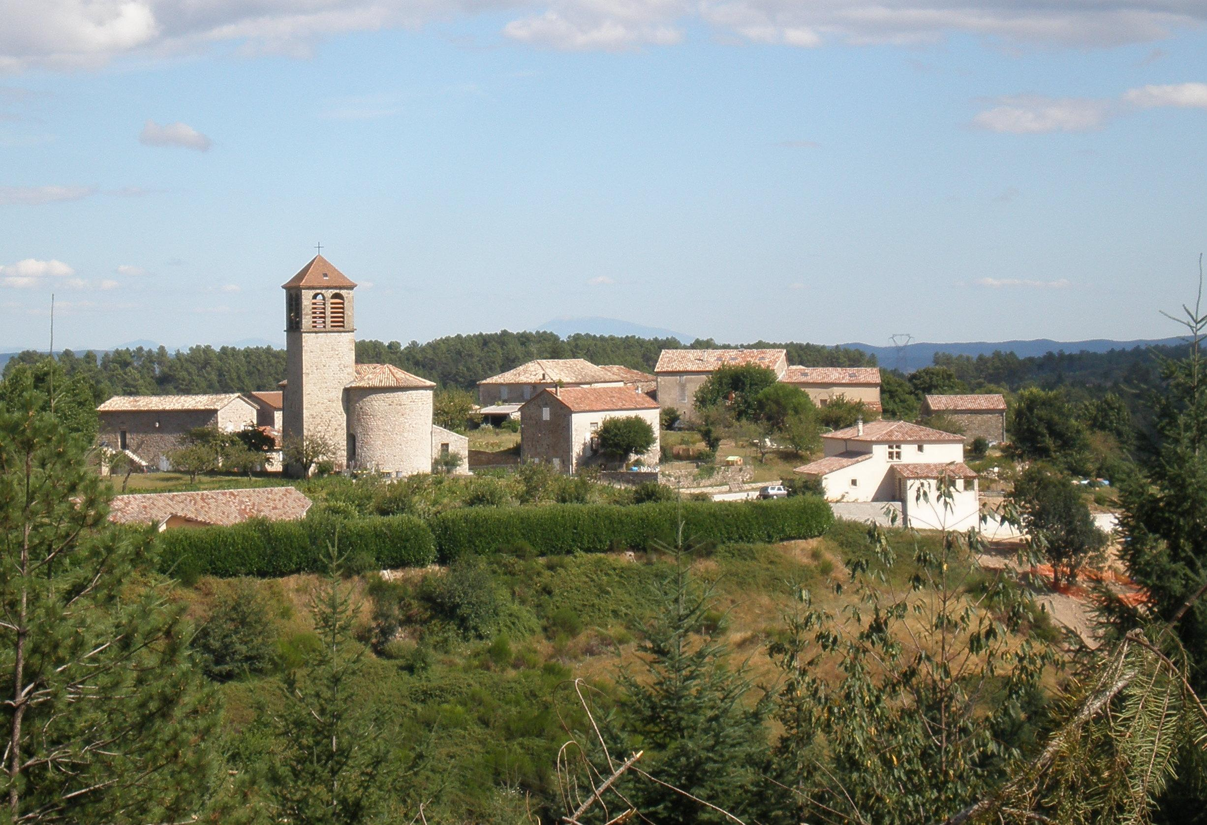 Le village de Lentillères